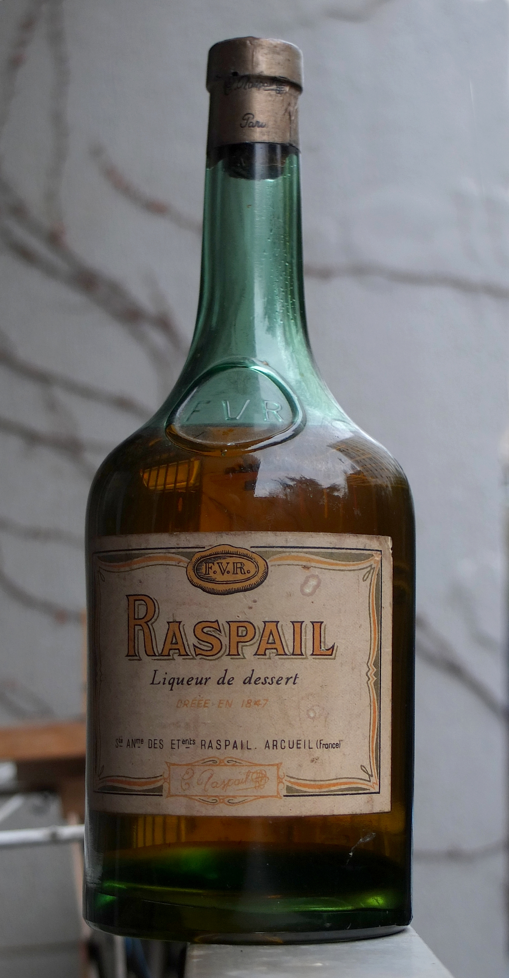 Liqueur Raspail, ancienne production, entre 1870 et 1940. Produite à Arcueil (Val-de-Marne).